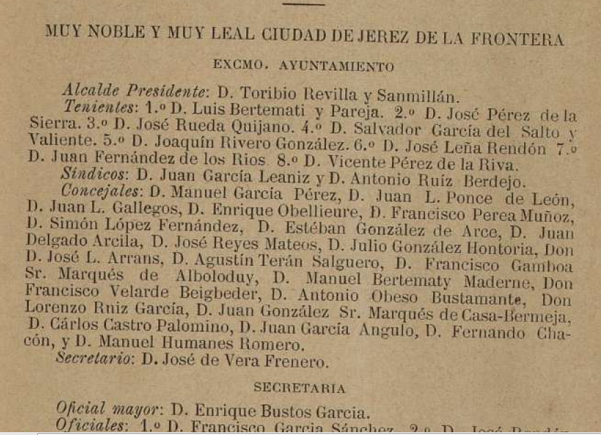 Excmo. Ayuntamiento de Jerez de la Frontera. Equipo de Gobierno Municipal. Año 1985